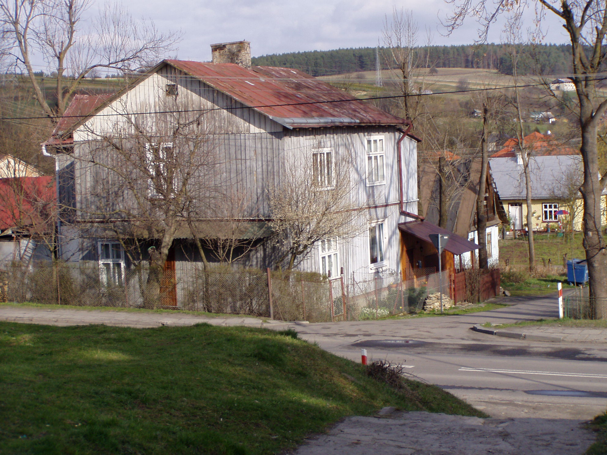 "Rabbi's house" Bircza Dawny dom rabina w Birczy